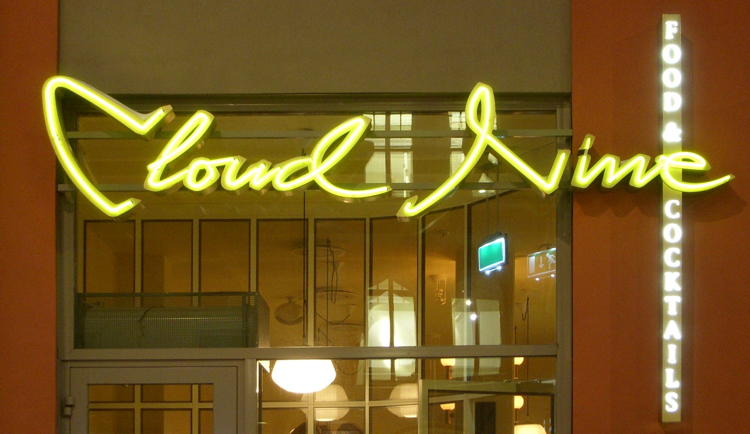 Cloud Nine, Stockholm, neonskylt 1:a pris för "Årets skylt" 1998